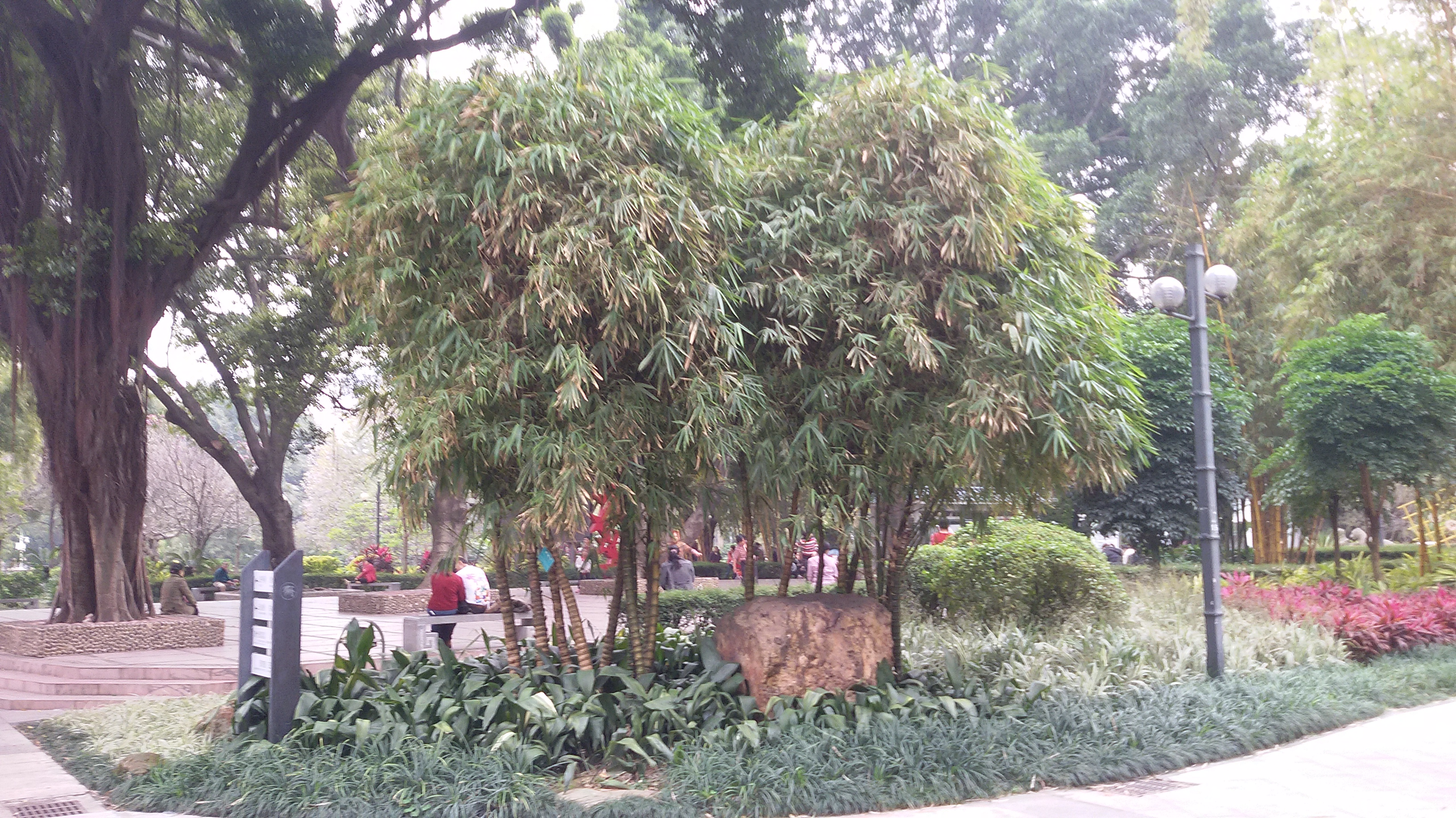 粵語: 喺曉港公園入面種嘅佛竹